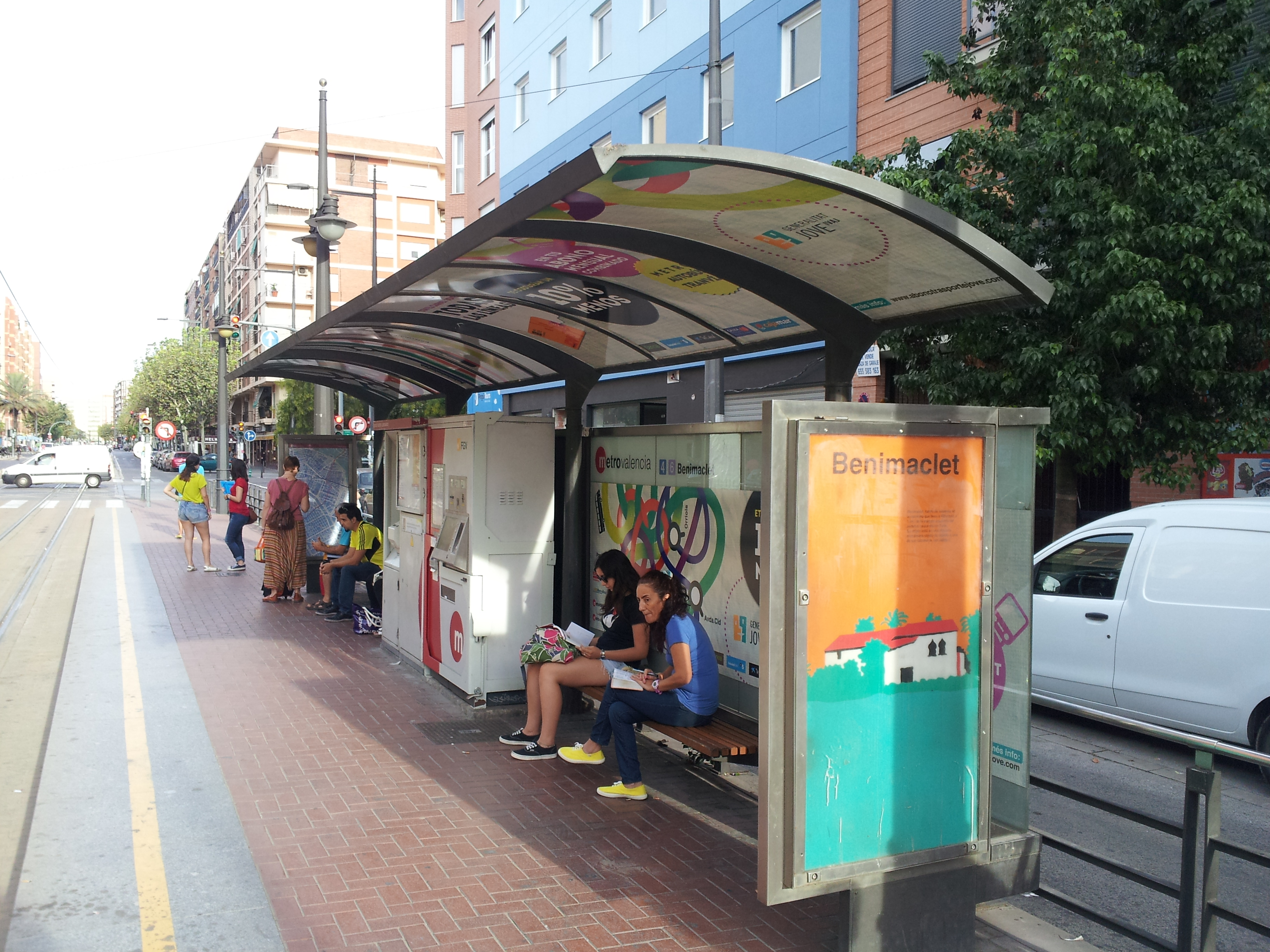 Parada de Tramvia.